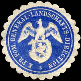 Sealing stamp Title: Königlich Preussische Pom. General - Landschafts - Direction Description: blau, weiß, geprägt Place: Stettin, Pommern size: 3 cm